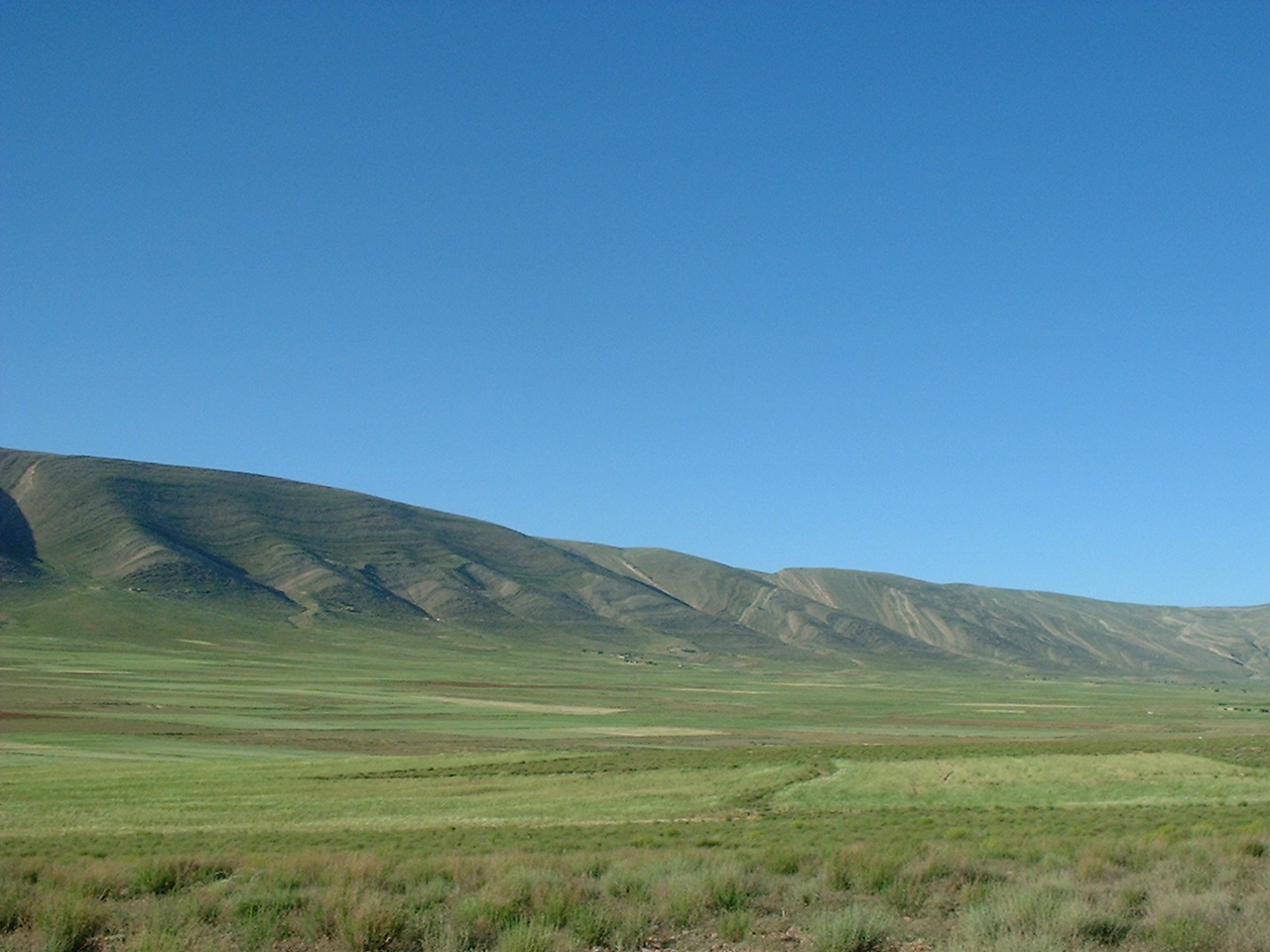 منظر من نيردي - بوزينة